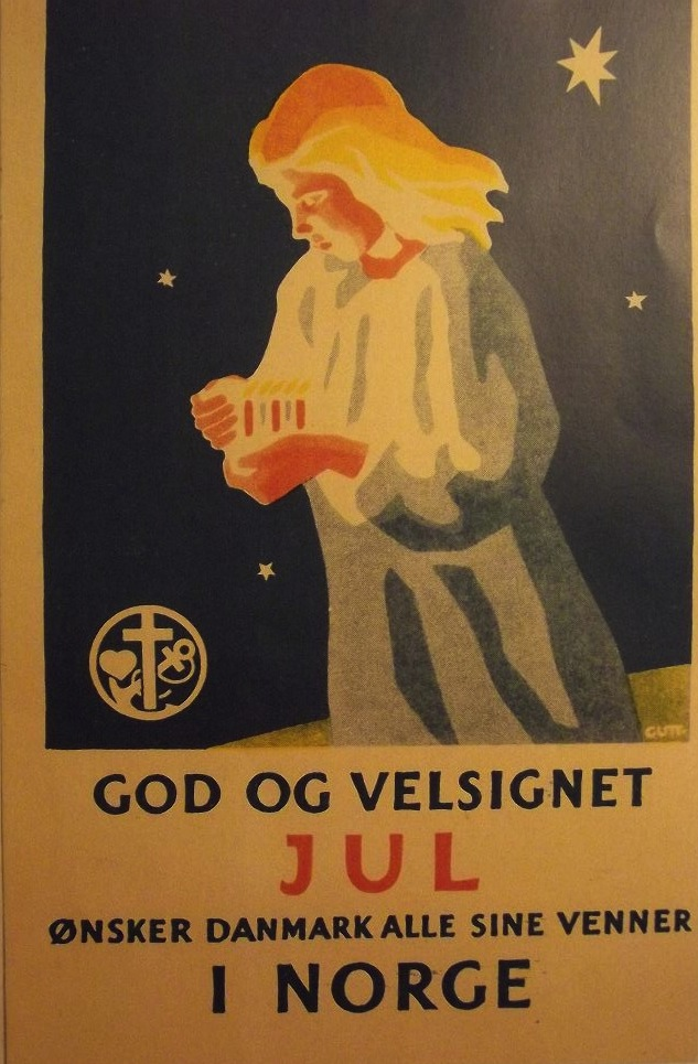 Under Anden Verdenskrig var der mange nødlidende børn i Norge. Også Viggo Guttorm-Pedersen engagerede sig i Norgeshjælpen som gennem indsamlinger ved skolerne i Danmark sørgede for bespisning af norske skolebørn. Her ses et typisk postkort blandt flere som solgtes i denne sammenhæng for at yde humanitær bistand